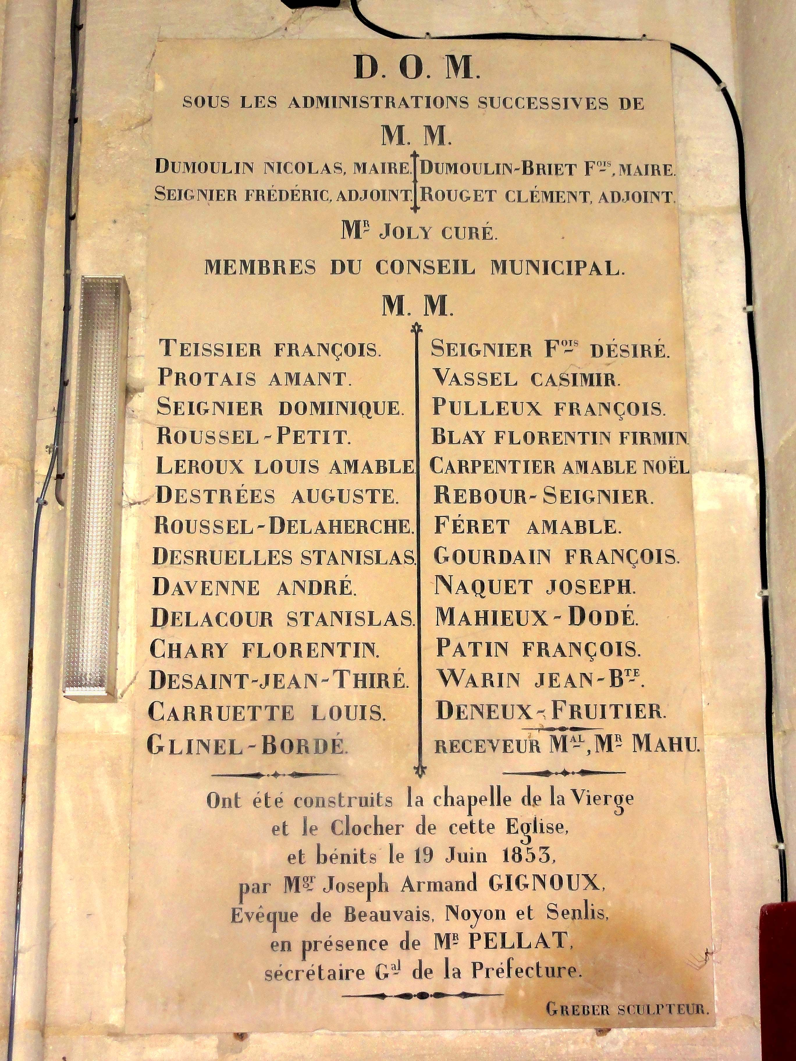 Mobilier de l'église (voir titre).